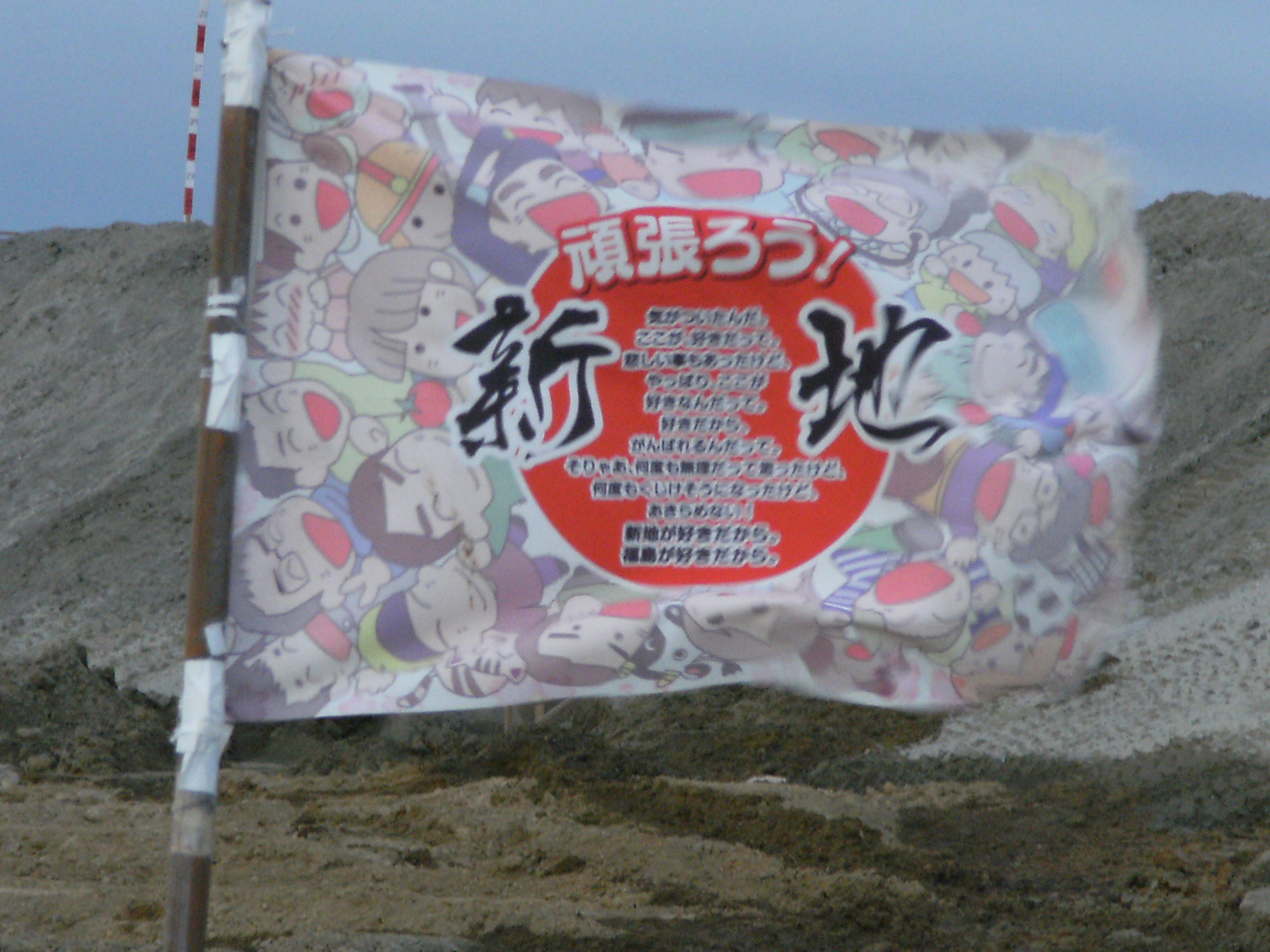 福島県新地町に立てられている復興祈願の旗